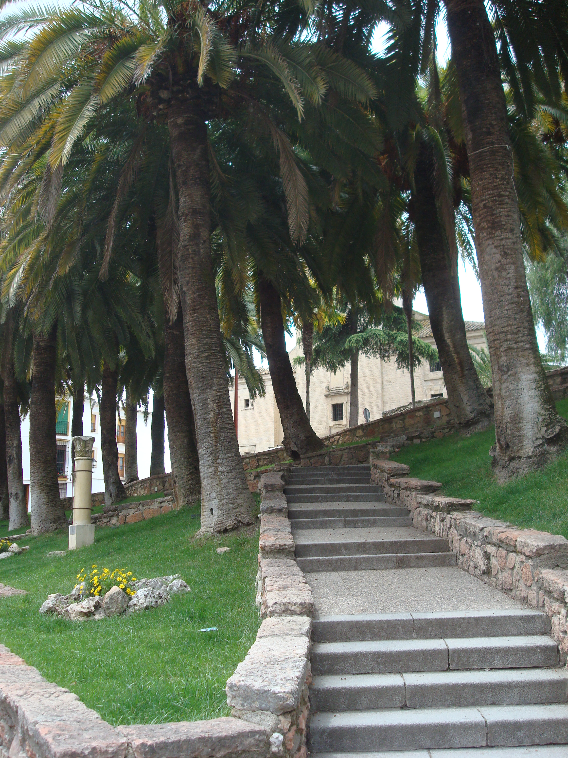 Cabra - 006